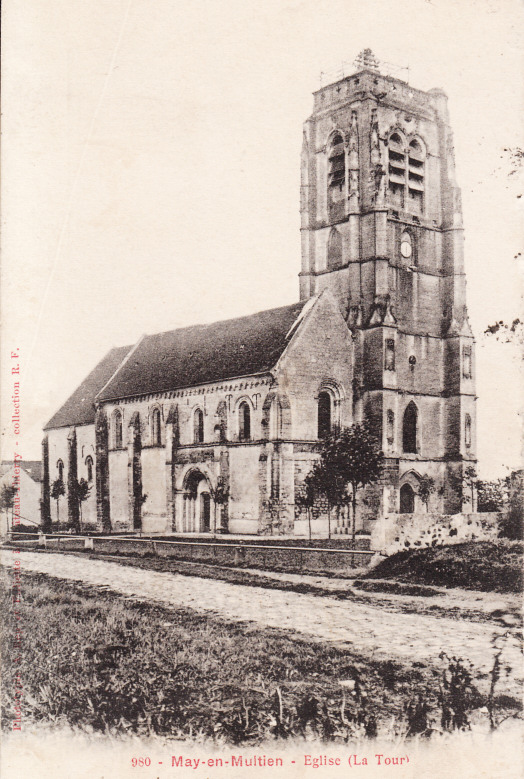 Tour de l'église de May, point géodésique